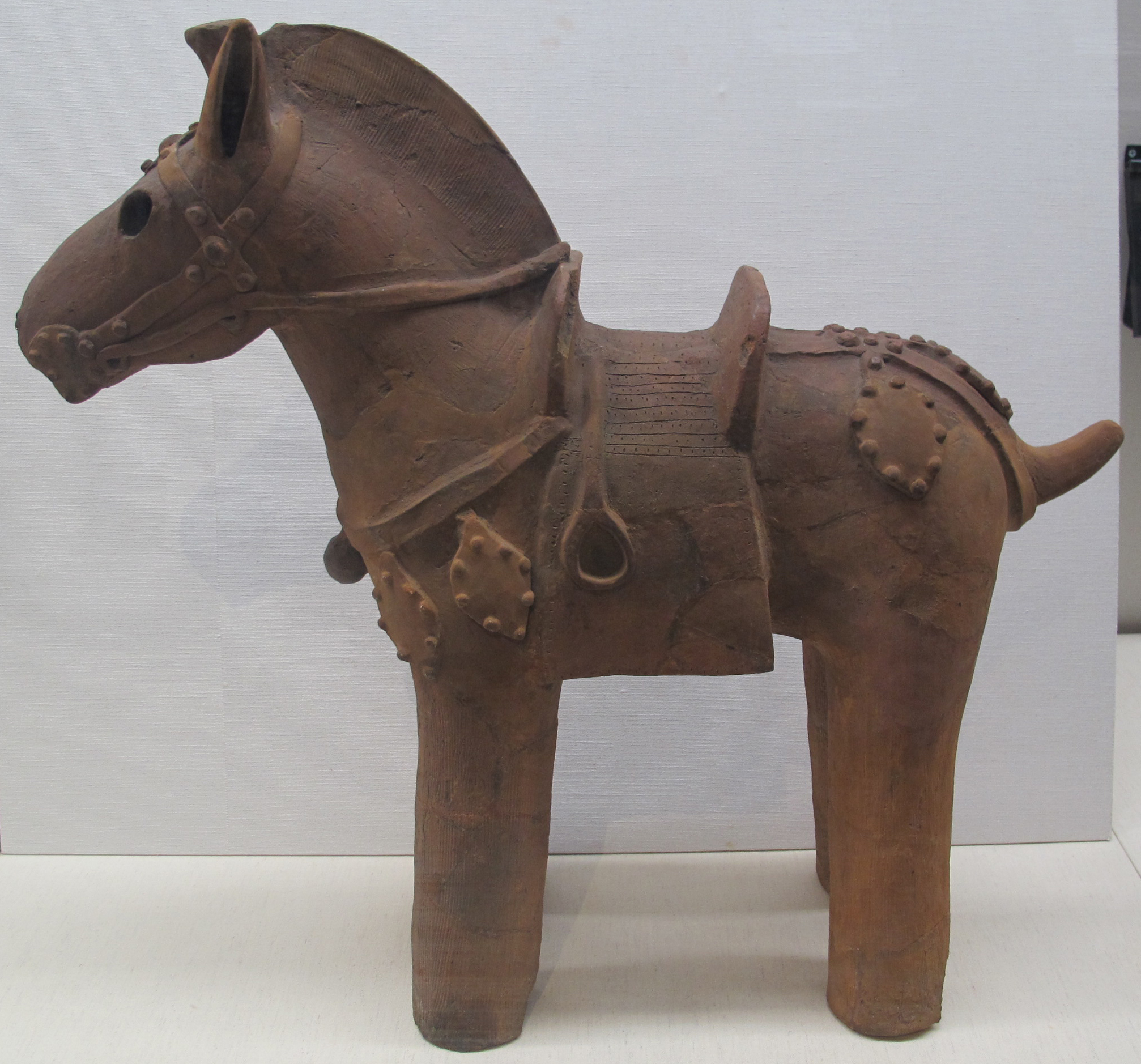 Periodo kofun, haniwa, cavallo, VI sec